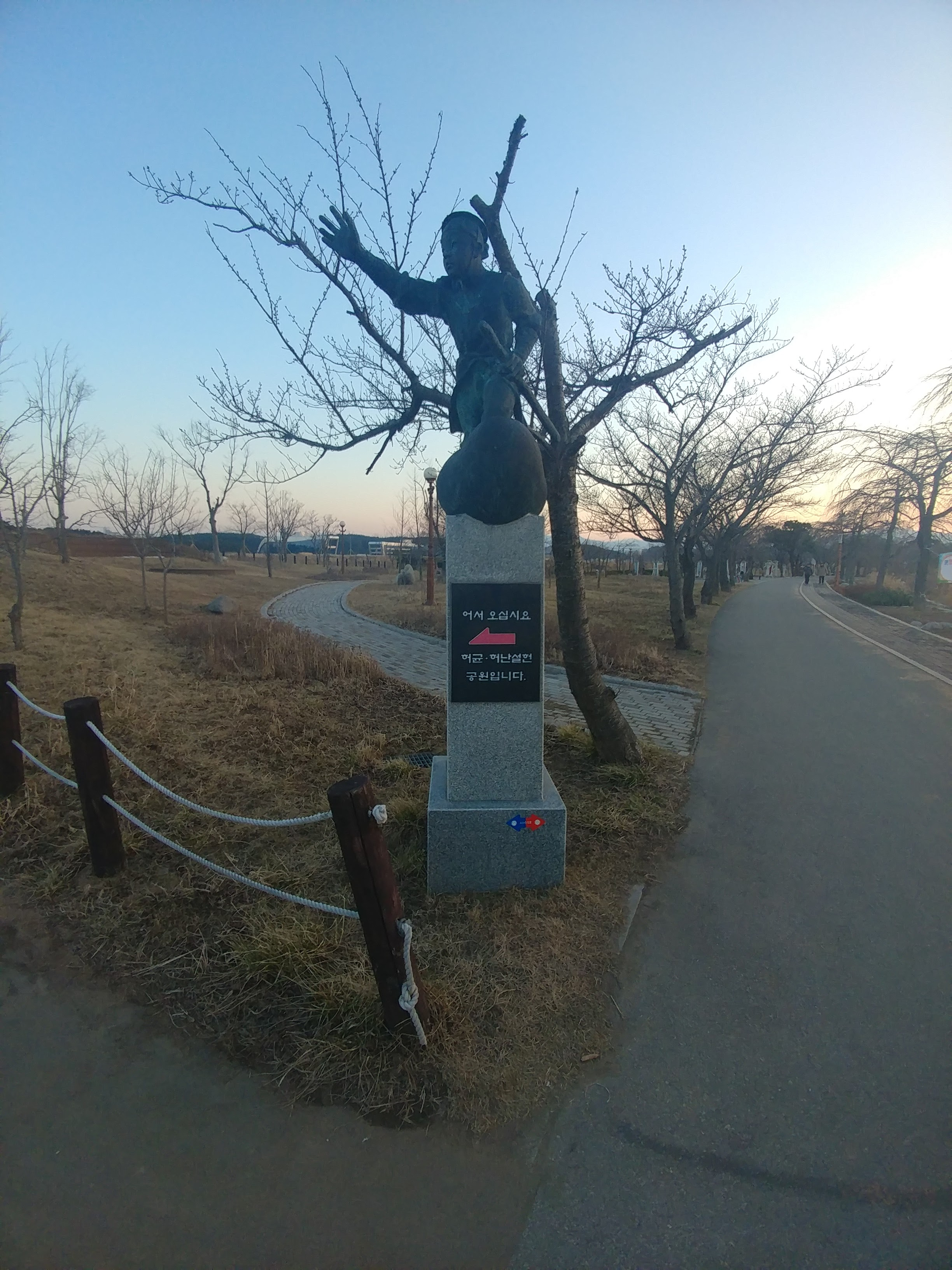 허균허난설헌공원 입구